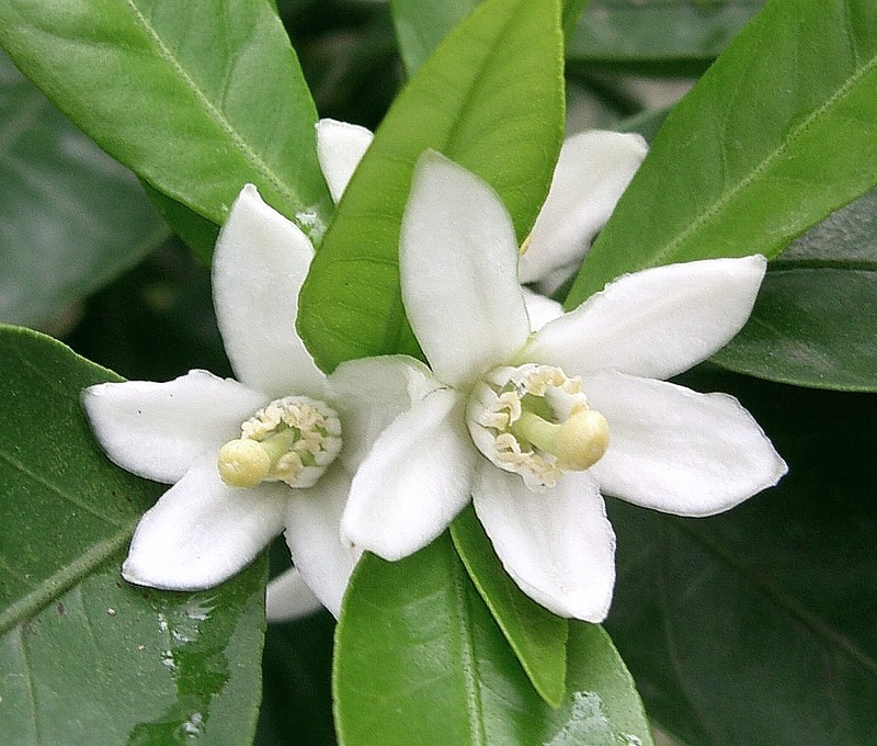 Citrus unshiu